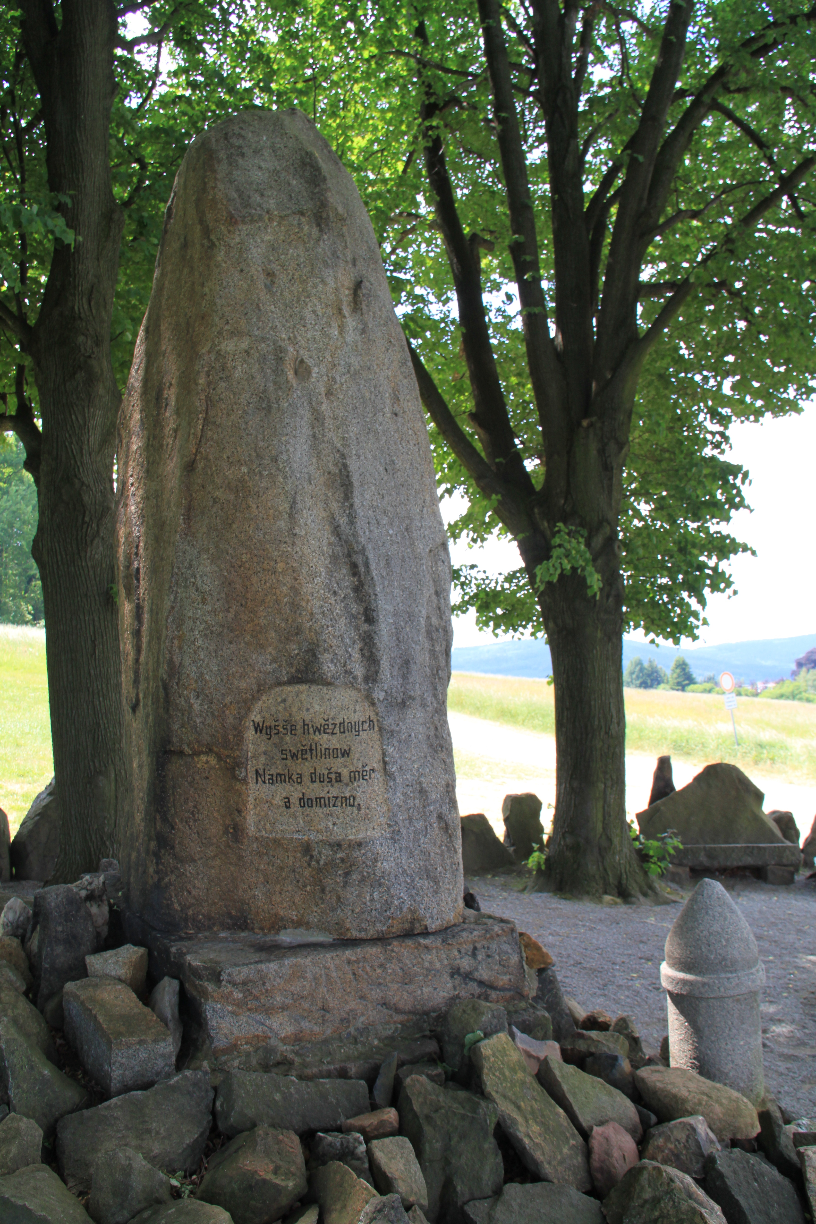 Impressionen Ebendörfel (Landkreis Bautzen) Hornjoserbsce: Wojerski pomnik nad Bělšecami